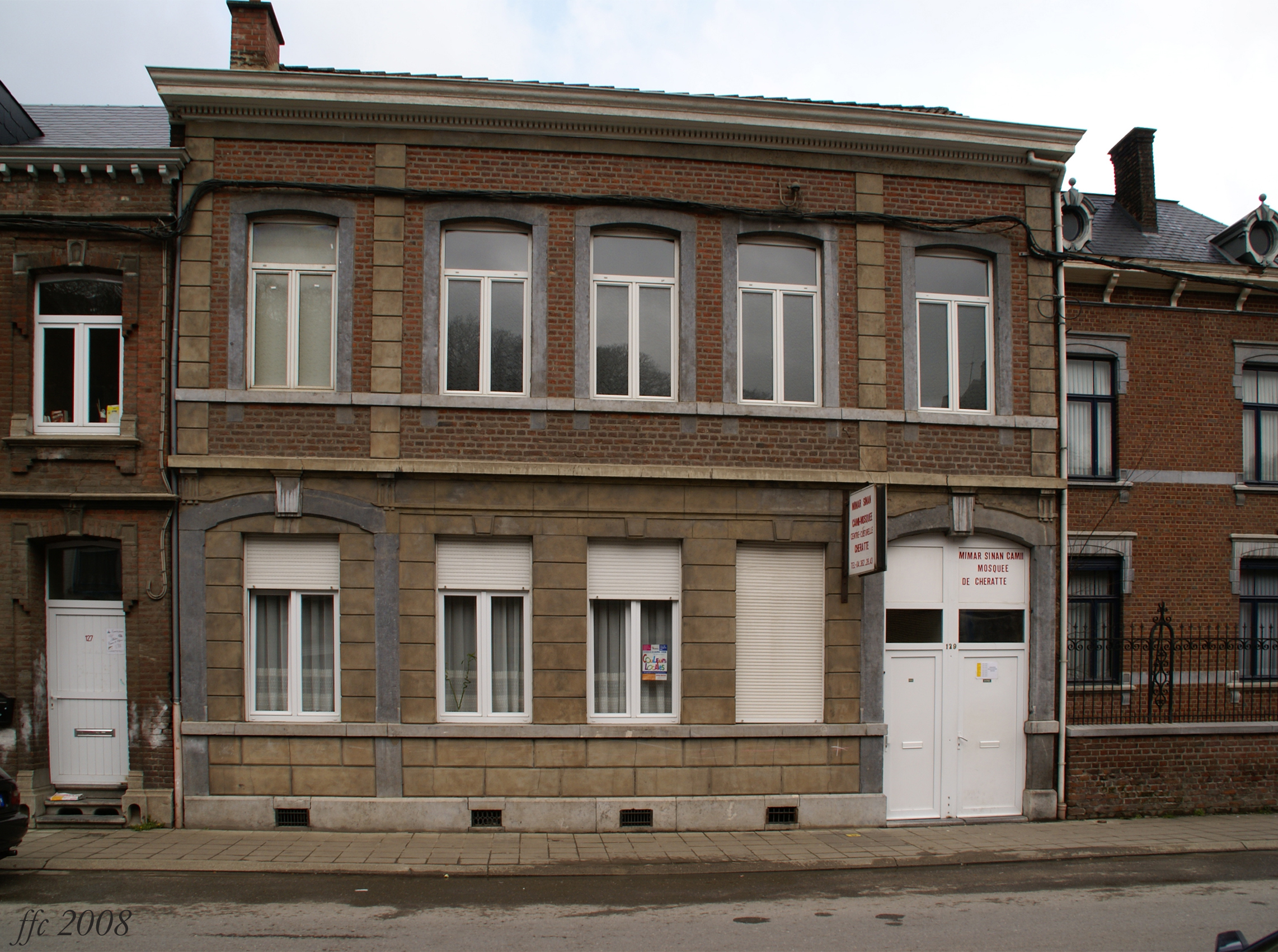 Cheratte (Belgium) MosqueMesquitaMosquéeMoskee